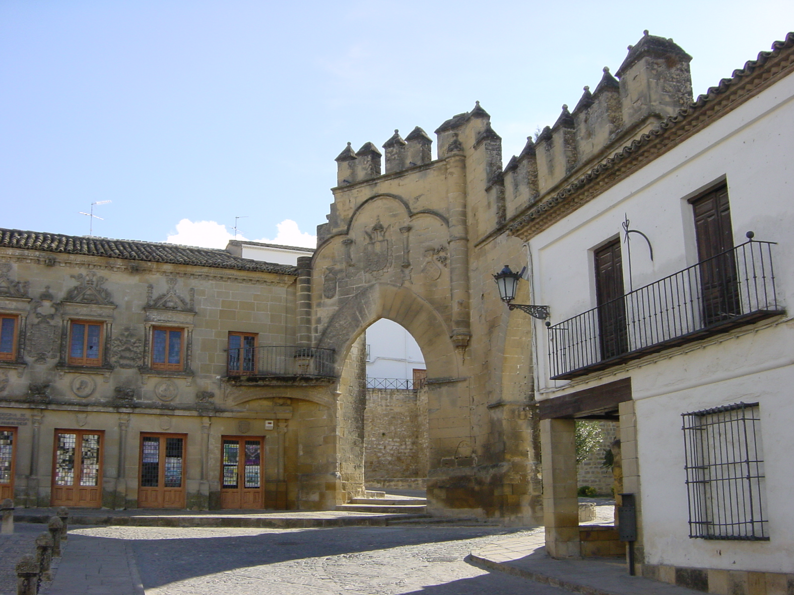 Baeza, Andalucía